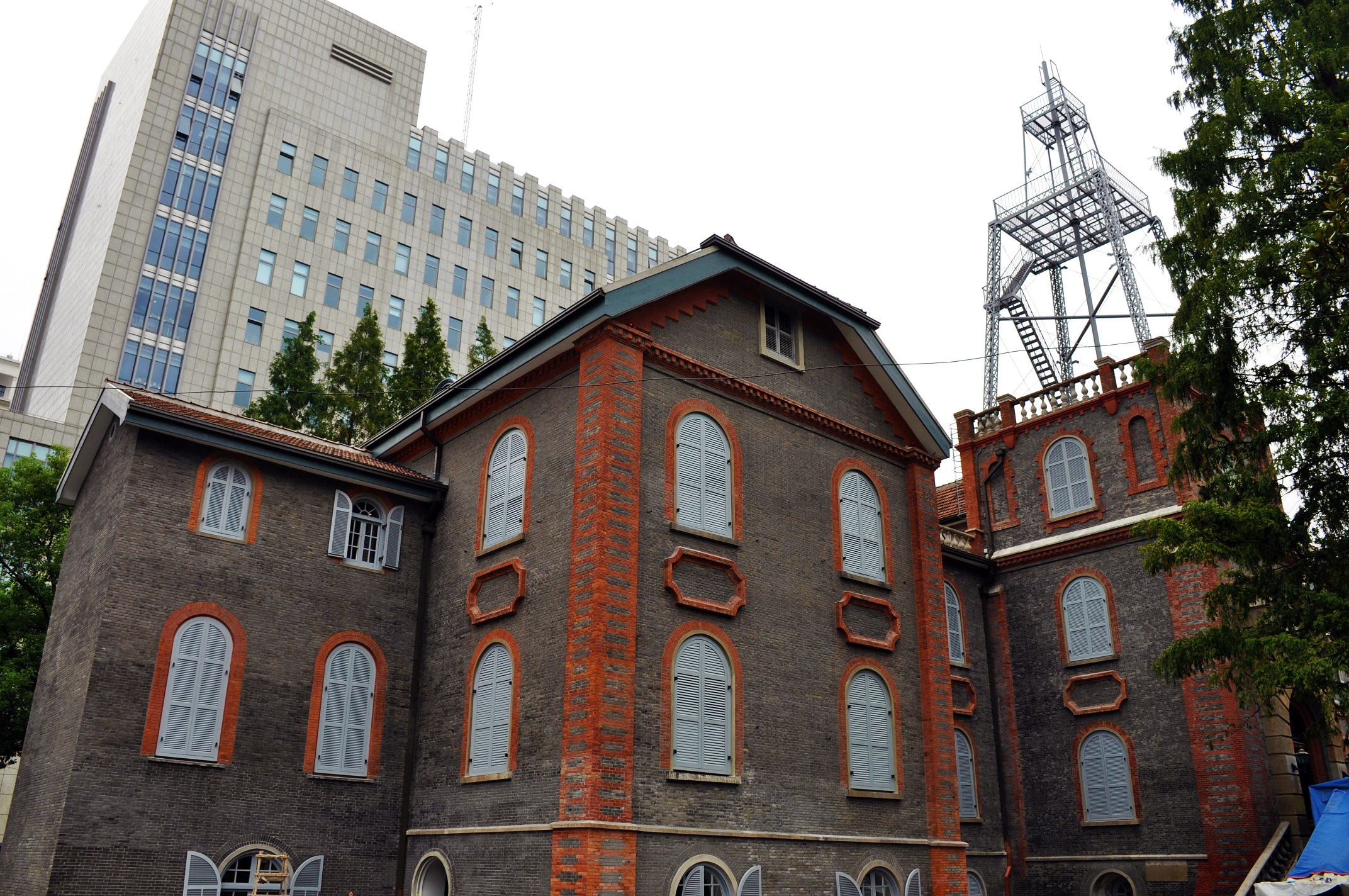 徐家汇观象台旧址 漕溪北路280号